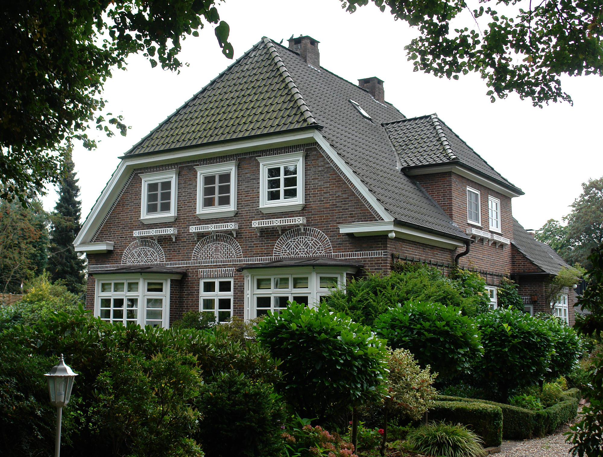 Wohnhaus in Bremen, Lindenweg 12.Das abgebildete Objekt ist ein geschütztes Kulturdenkmal in der Freien Hansestadt Bremen, mit der Nr. 0844 beim Landesamt für Denkmalpflege registriert.